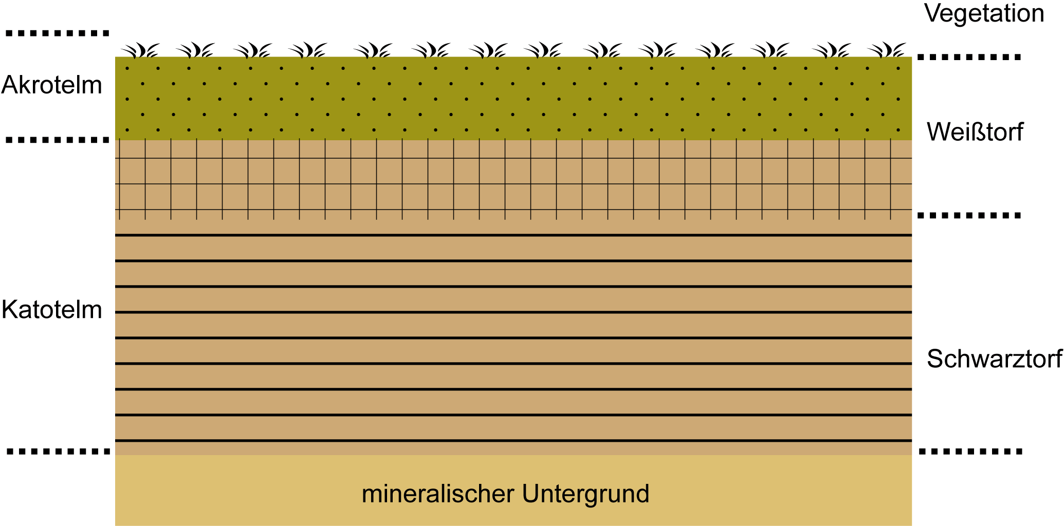 Aufbau wachsender Moore